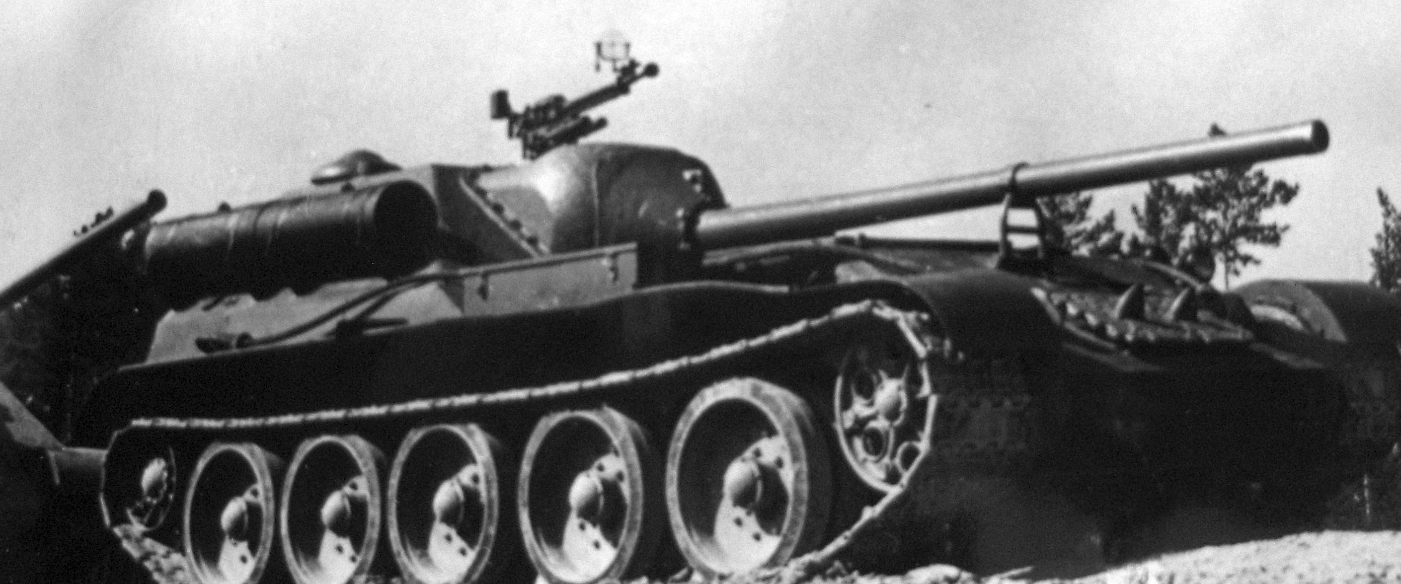 Опытная самоходная установка СУ-101. Ходовые испытания